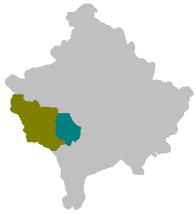 Municipio de Orahovac en Kosovo